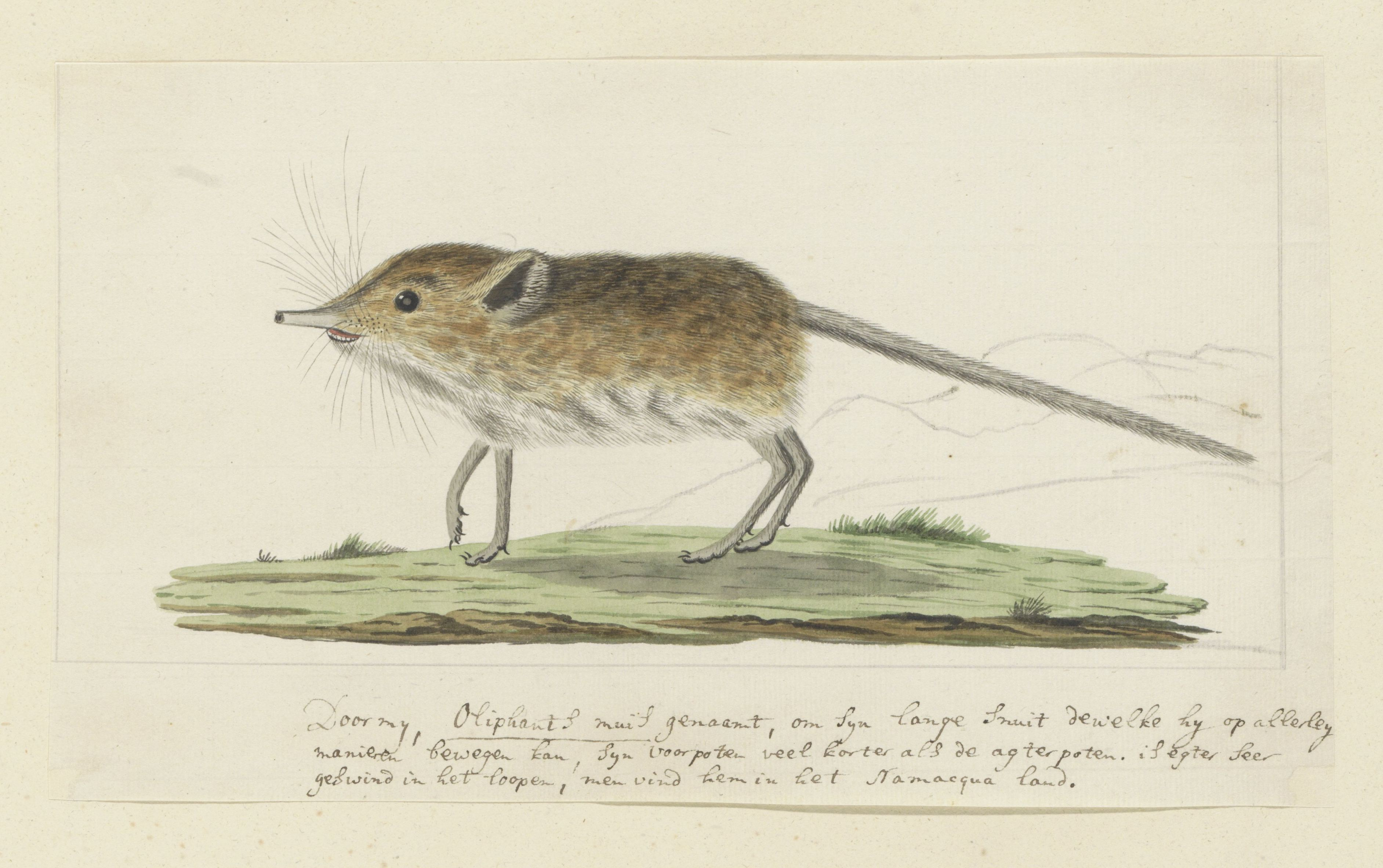 IdentificatieTitel(s): Macroscelides proboscideus (Slurfspitsmuis)Objecttype: tekening albumblad Objectnummer: RP-T-1914-17-230Opschriften / Merken: annotatie, onder in de marge, pen in bruin: ‘Door mij, Oliphantsmuis [onderstreept] genaamt, [...]’ (in Gordon's handschrift; volledige tekst in: L.C. Rookmaker, Appendix I van zijn scriptie, p. 196)VervaardigingVervaardiger: tekenaar: Robert Jacob GordonDatering: jun-1779 - jan-1780Fysieke kenmerken: pen in bruine inkt, penseel in waterverf in kleuren, potlood of zwart krijt, kaderlijnen in potloodMateriaal: papier inkt waterverf potlood krijt Techniek: pen / penseelAfmetingen: albumblad: h 660 mm × b 480 mmblad: h 172 mm × b 295 mmbeeld: h 140 mm (binnen kader) × b 284 mmToelichtingDeterminatie gebaseerd op de korte oren.Verwerving en rechtenCredit line: Aankoop met steun van particulierenVerwerving: aankoop 1914Copyright: Publiek domein